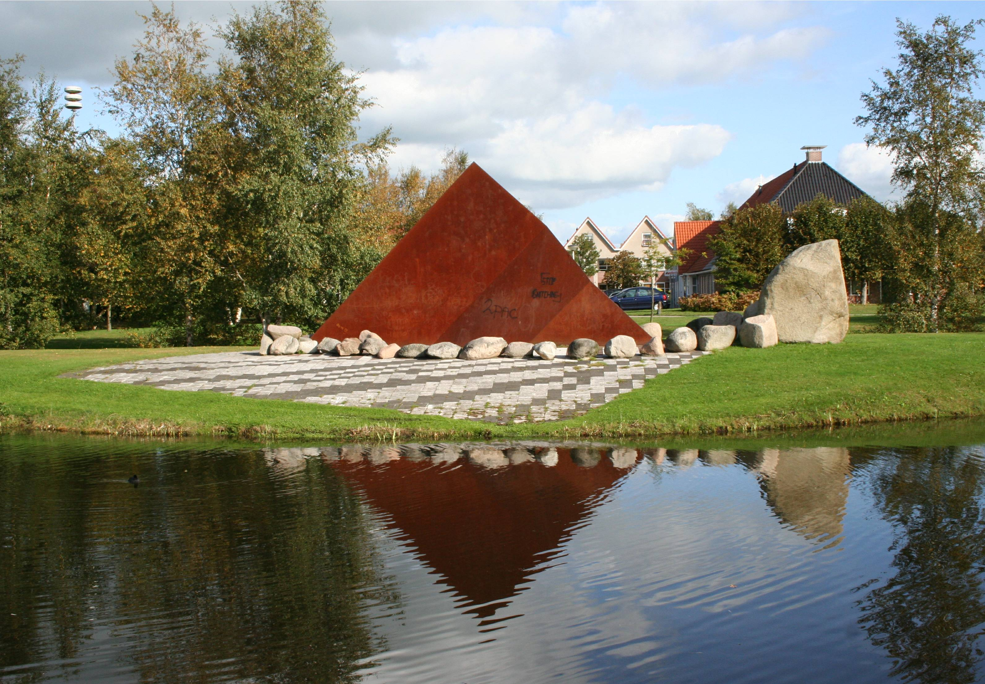 Elsberg & Draaijers, 1990